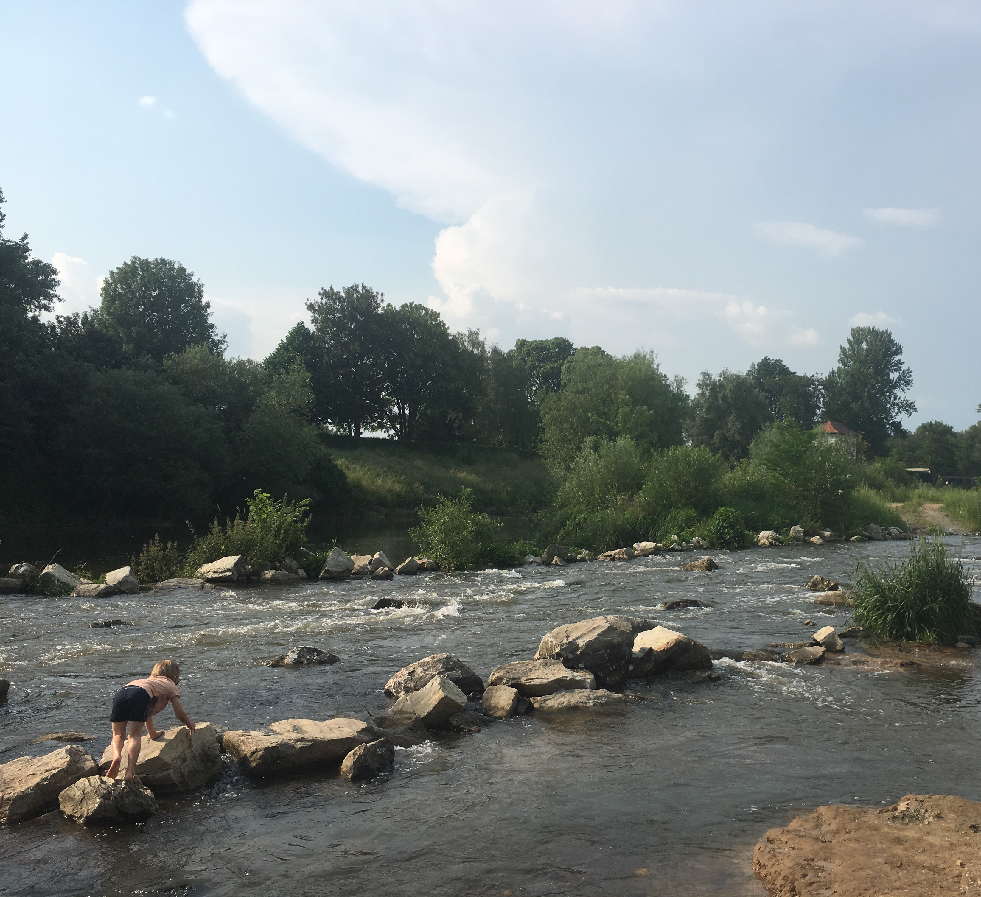 Die renaturierte Nidda ist besonders im Sommer ein Anziehungspunkt für die Bewohner der umgebenden Siedlungen.